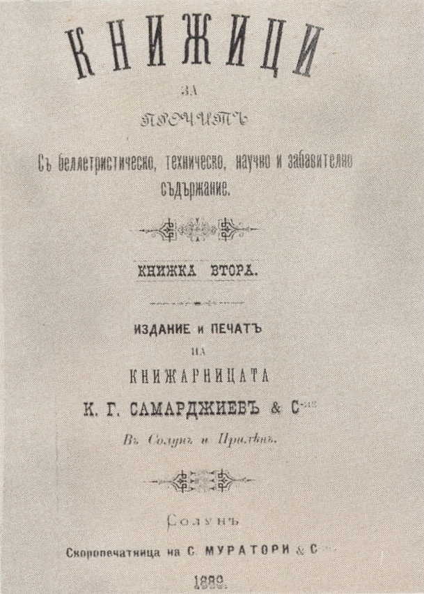 Книжици за прочит. Солун, 1889 година (титул)